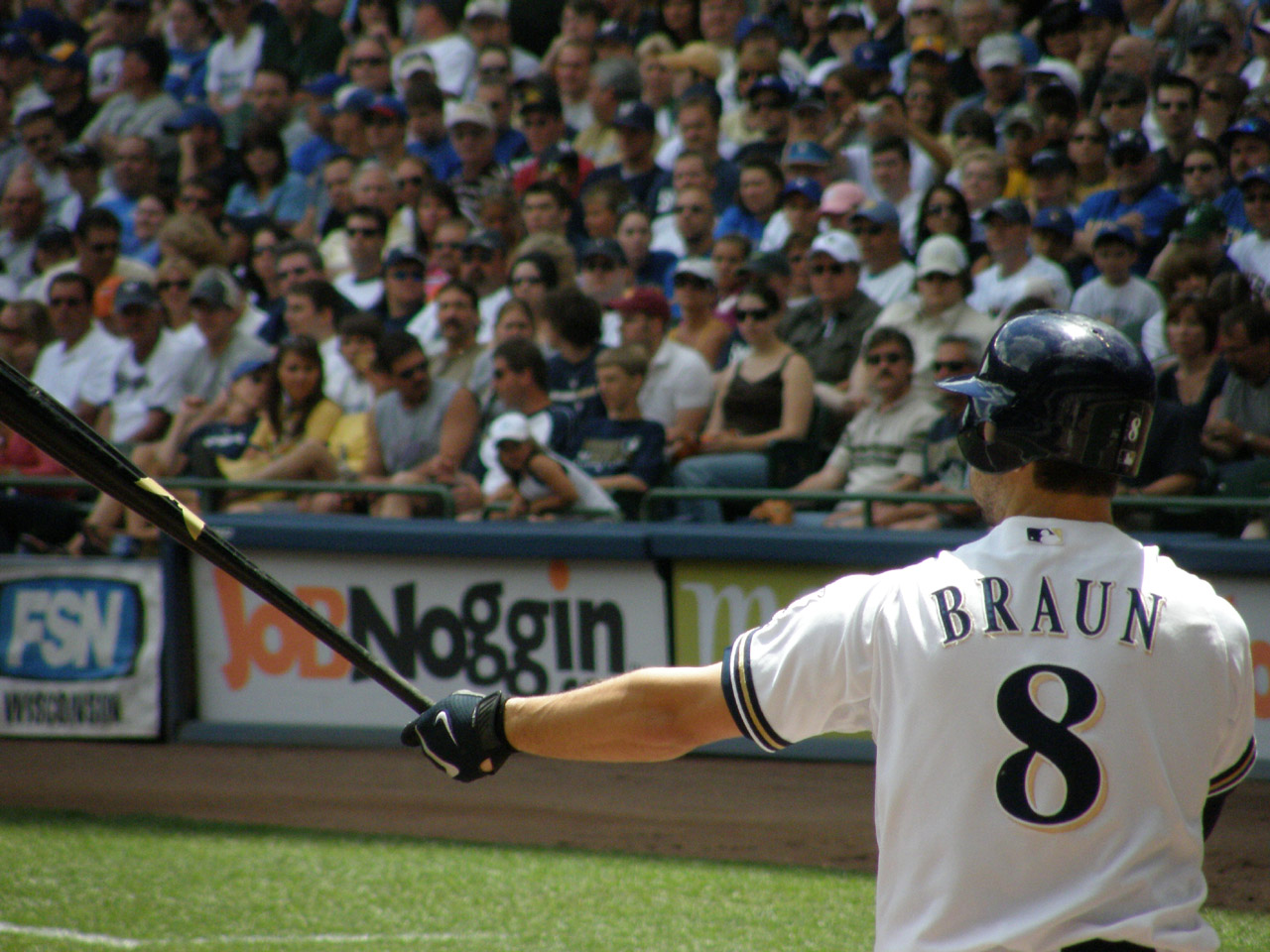 Ryan Braun